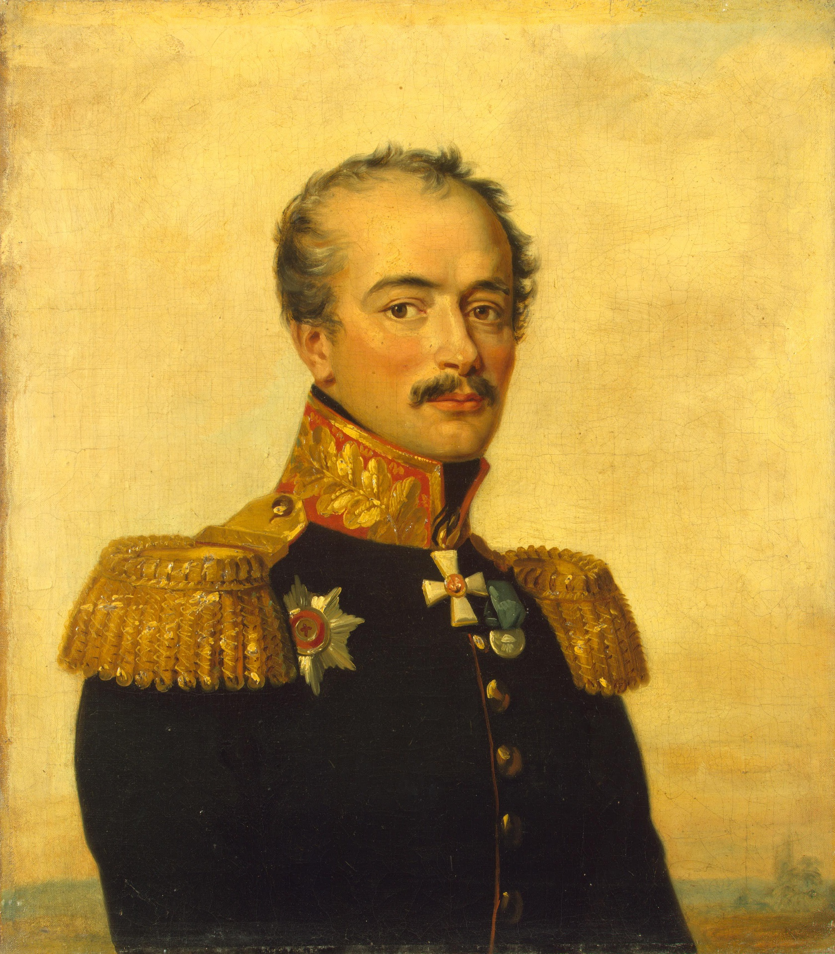 Ivan Mihailovich Vadbolsky (1781 – 1861) russian general